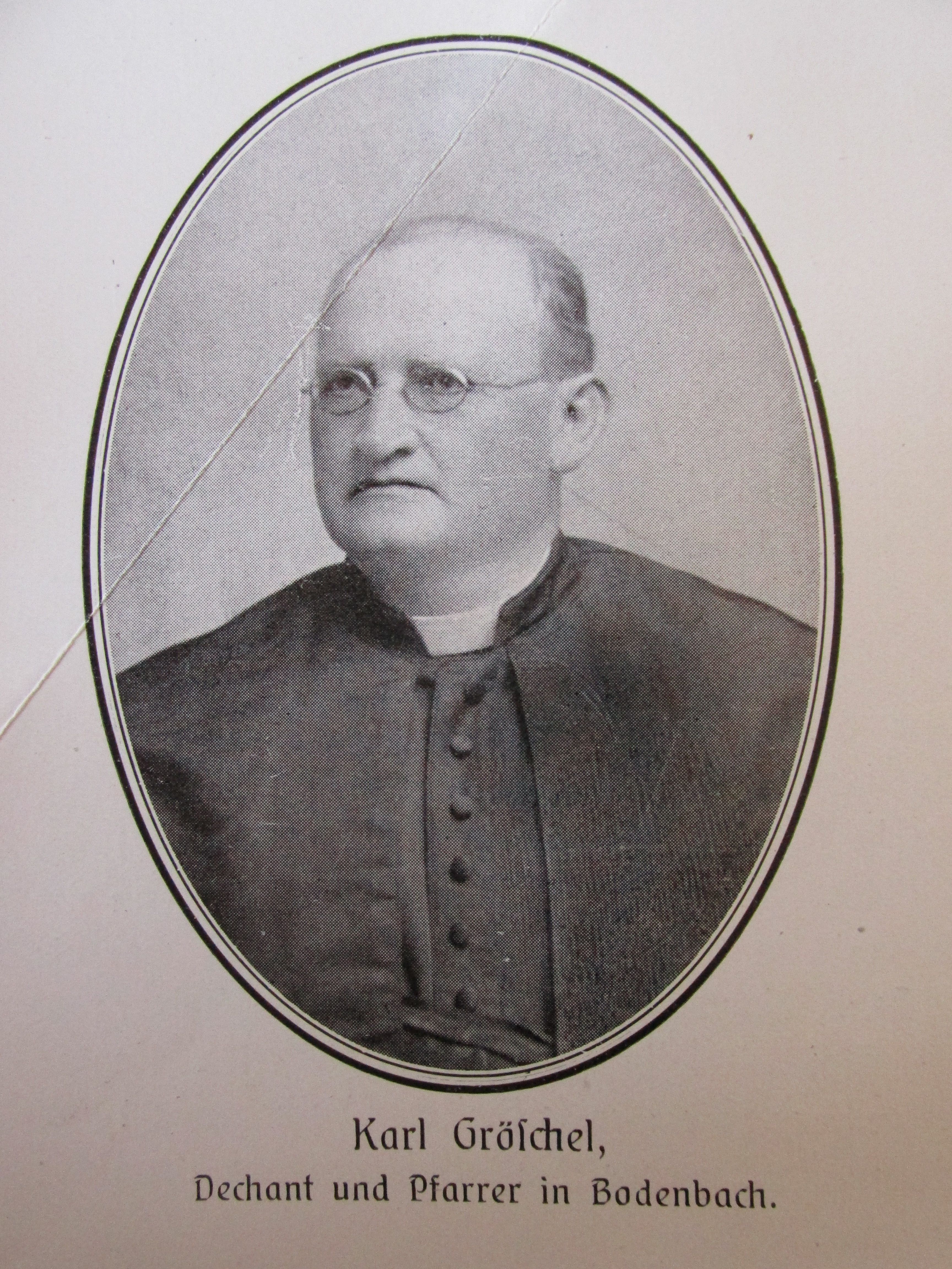 P. Karl Gröschel; * 30. 01. 1846 Liboňov okres Ústí nad Labem (fara Chlumec), čp. 1; syn: Joseph Gröschel, syn Ignatze Gröschela a Anny Marie roz. Wald; Marie Anna, dcera Antona Staudra a Rosalie roz. Tirlin; gymnaziální studia na Gymnáziu v Bohosudově a Mostě; filosoficko - teologická studia v Litoměřicích; ord. na kněze 1870; kaplan v Krásném Lese; administrátor v "Biela"; administrátor v Neschwitz; administrátor v Libouchci; kaplan v Děčíně; zámecký kaplan v Děčíně; farář v Děčíně - Podmoklech (od 20. 12. 1880); osobní děkan; biskupský vikariátní sekretář a notář + 04. 04. 1912 Děčín - Podmokly